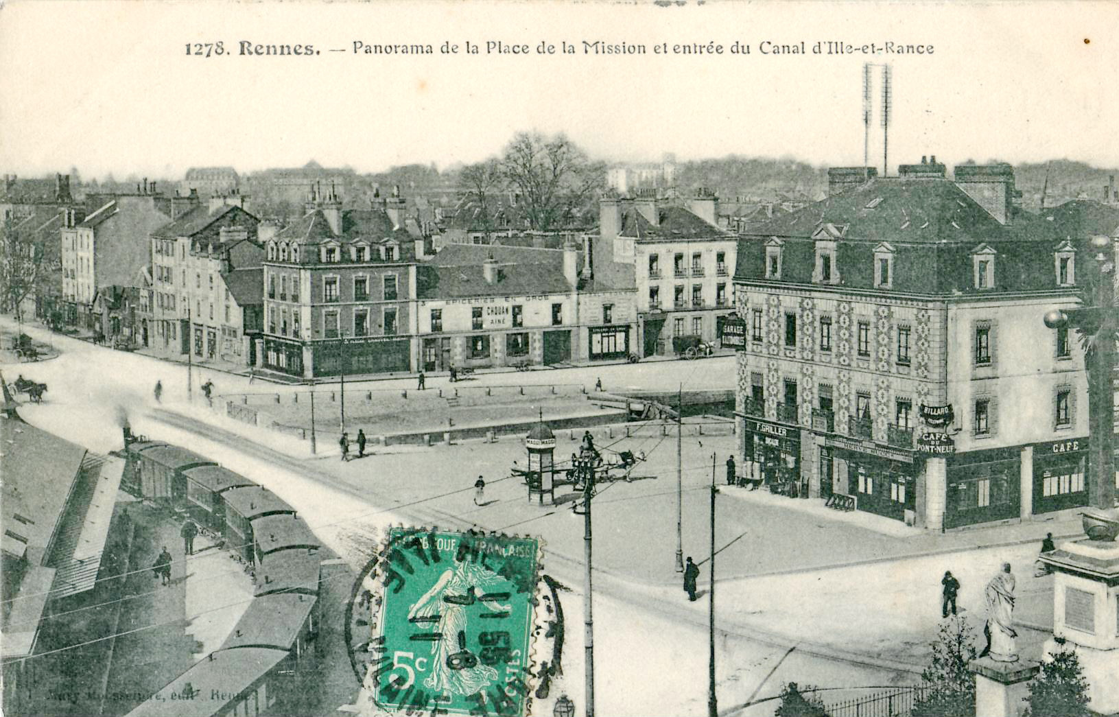 Carte postale éditée par E. Mary-Rousselière n°1278 :RENNES - Panorama de la Place de la Mission et entrée du Canal d'Ille-et-Rance